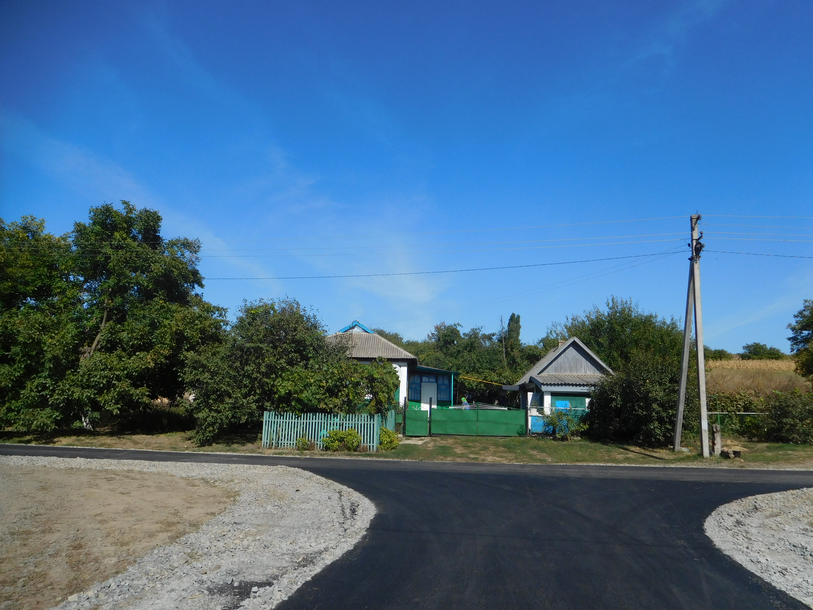 Вікіекспедиція Північ Одещини